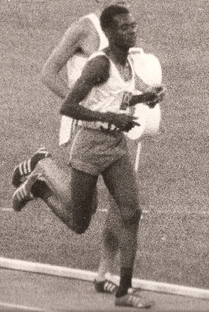 Finale du 5000 mètres aux Jeux olympiques d'été de 1968 à Mexico voyant Mohammed Gammoudi remporté la médaille d'or